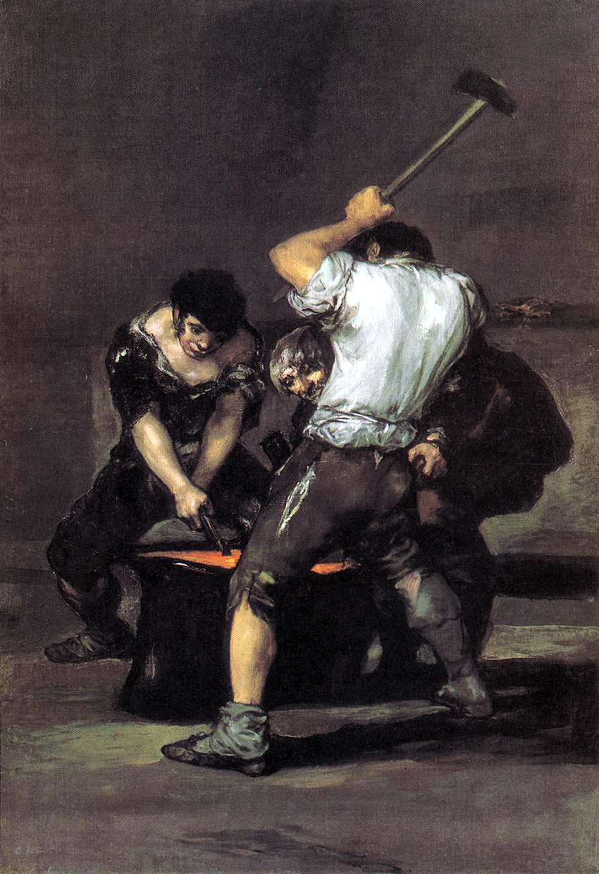 La fragua. Óleo sobre lienzo. 181,6 x 125 cm. Frick Collection, Nueva York, USA.